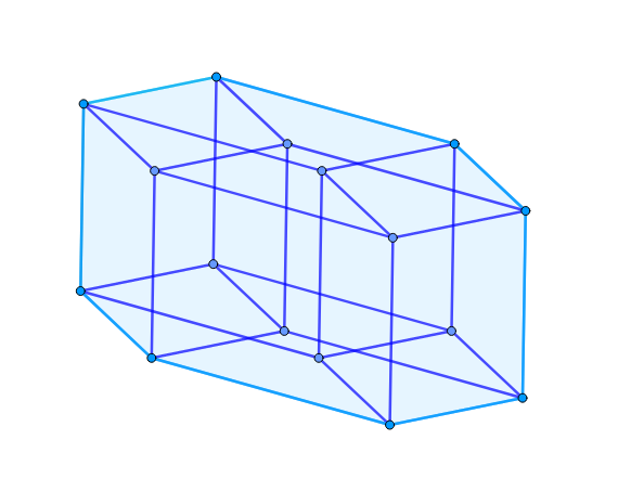 Файл загружен для статьи "зоногон" - ярко-синим выделена граница проекции, образующая зоногон.